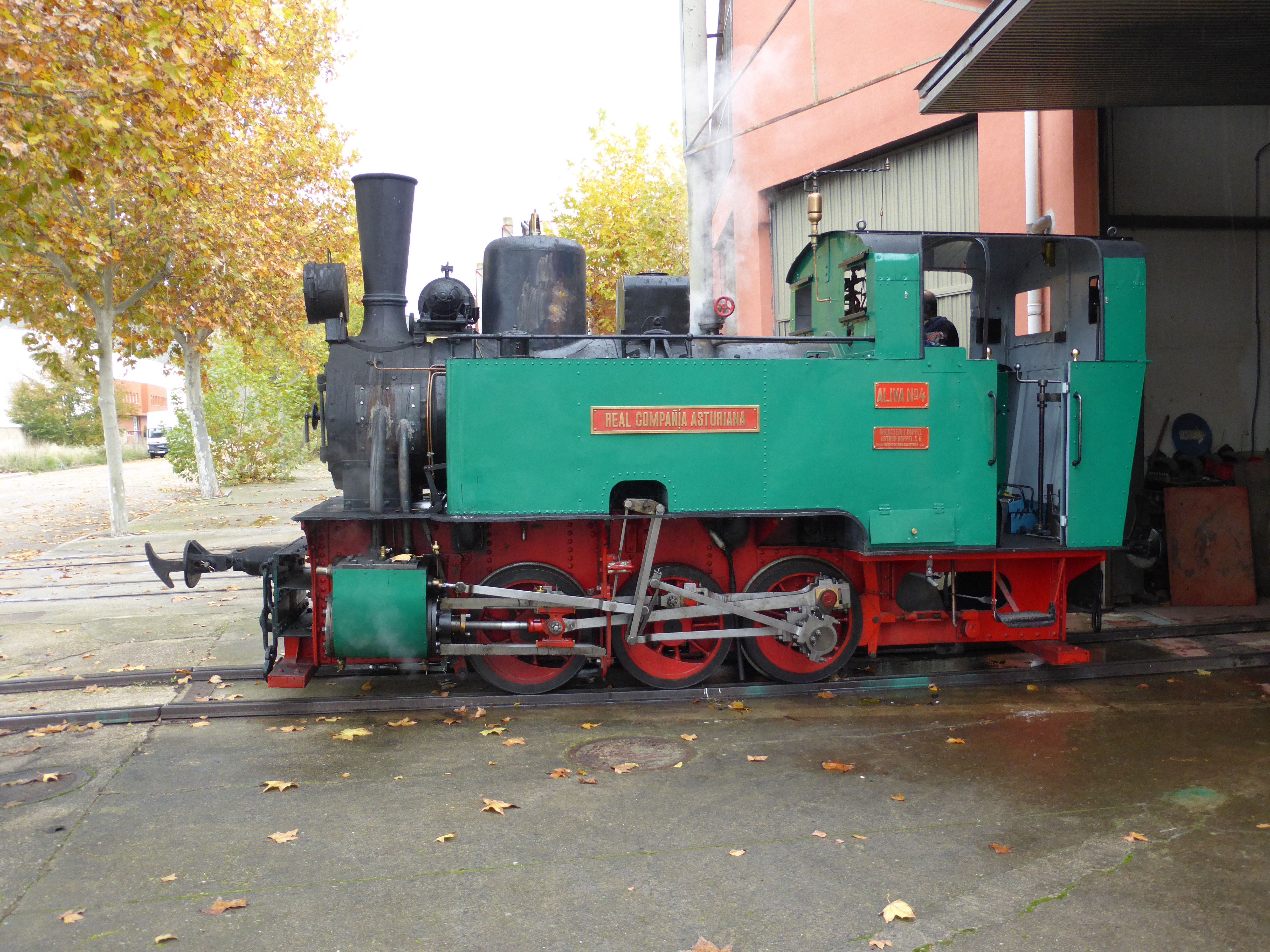 Fue fabricada por Orenstein & Koppel (O & K) en 1926, en Alemania. Su número de construcción es el 11198, que está grabado en numerosas piezas. Ha sido restaurada por el CIFVM (Vapor-Madrid), en su sede de La Poveda, en el municipio de Arganda del Rey, en la provincia de Madrid (España). A finales de noviembre de 2016 ha entrado en servicio, encabezando trenes turísticos, entre La Poveda y el apeadero de la Laguna del Campillo. Está matriculada con el número 4. Es de vía métrica.